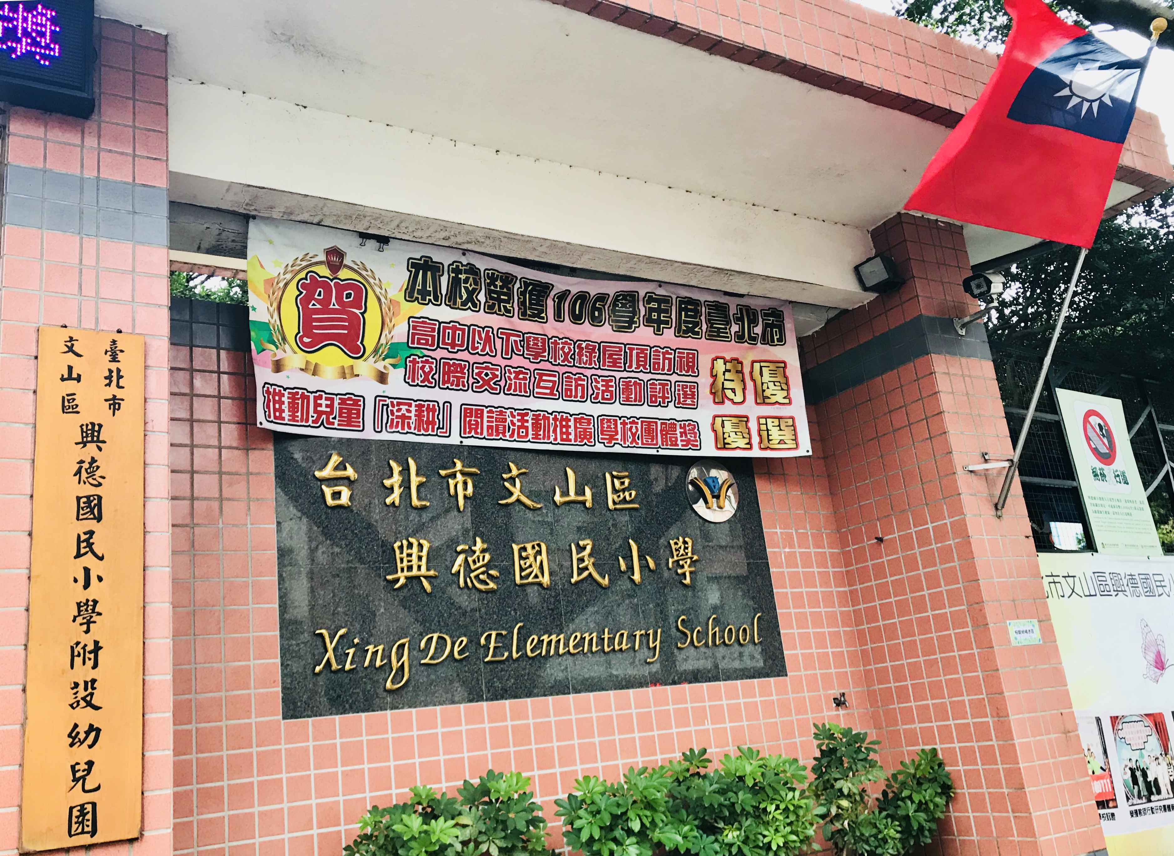 臺北市文山區興德國小大門招牌